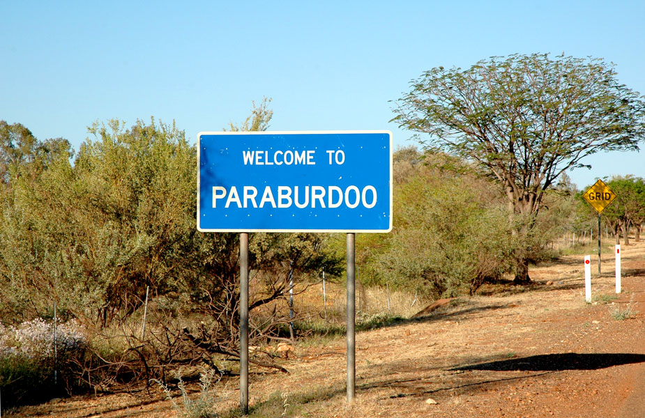 Welcome to Paraburdoo